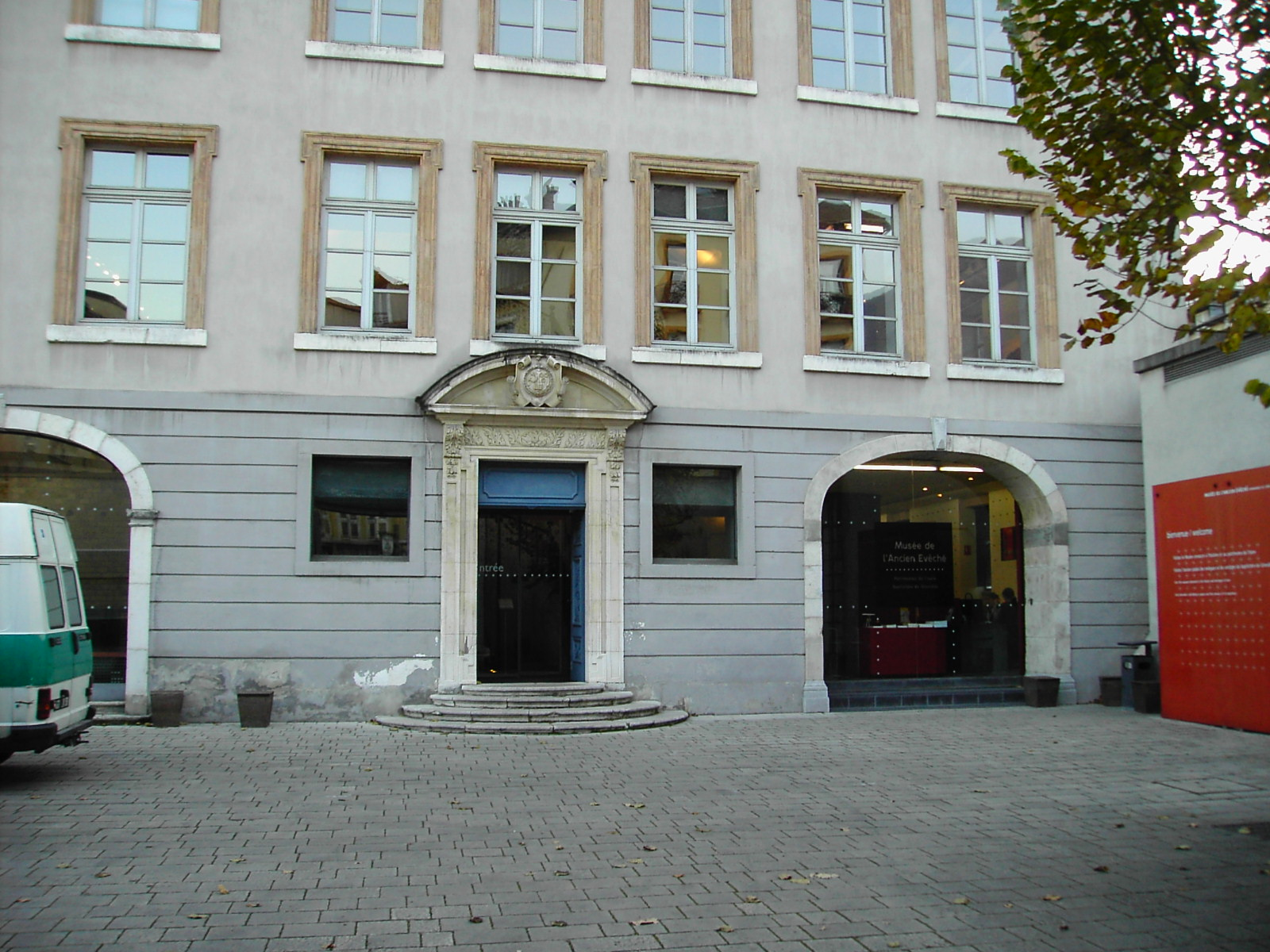 façade musée de l'ancien évéché - Grenoble